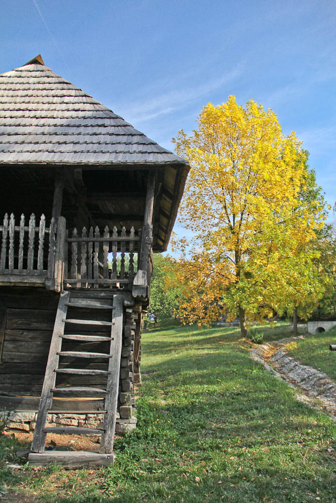 Peisaj din sectia in aer liber a muzeului Etnografic al Transilvaniei, locatie cunoscuta si cu numele de " muzeul satului "